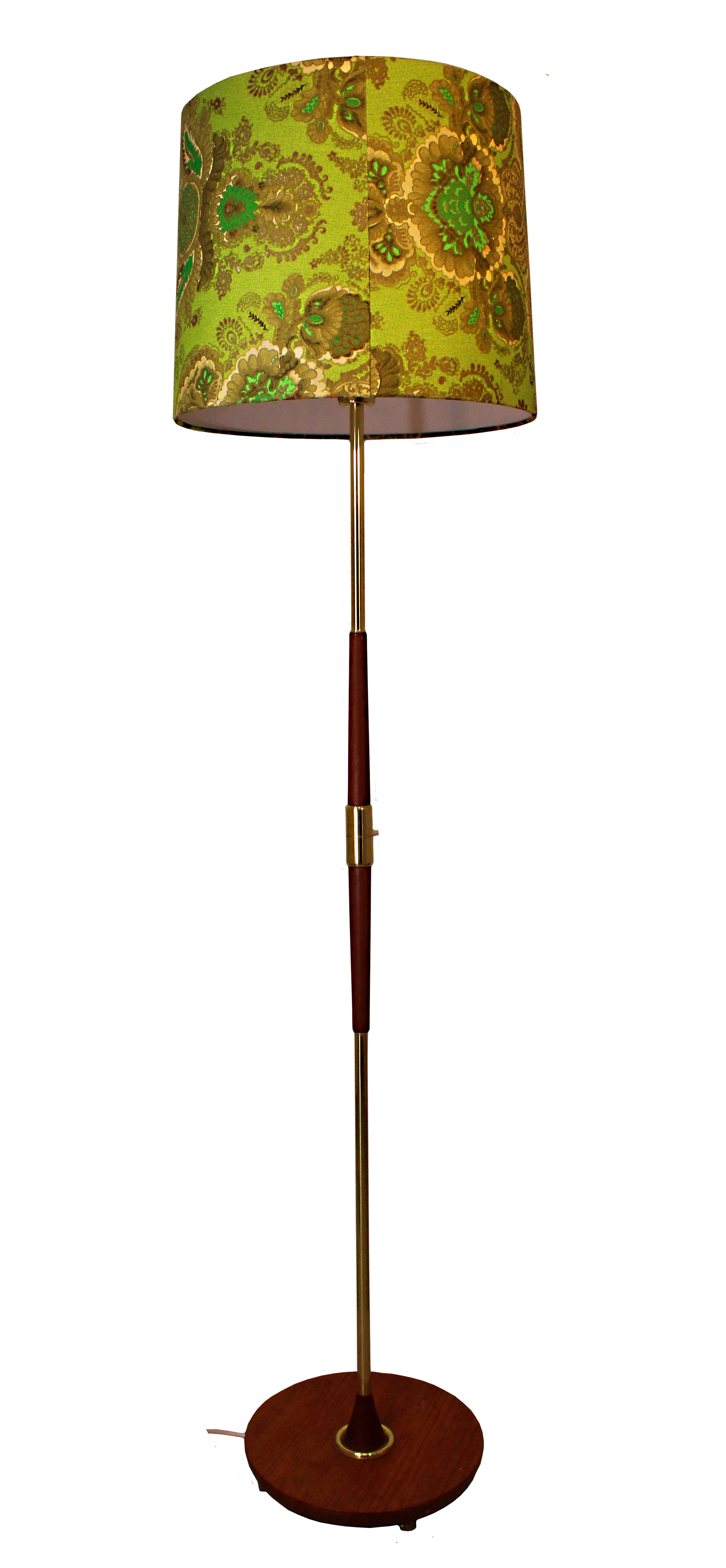 Golvlampa från 1950-talet, antik inredning, antika möbler, antika lampor, antik belysning